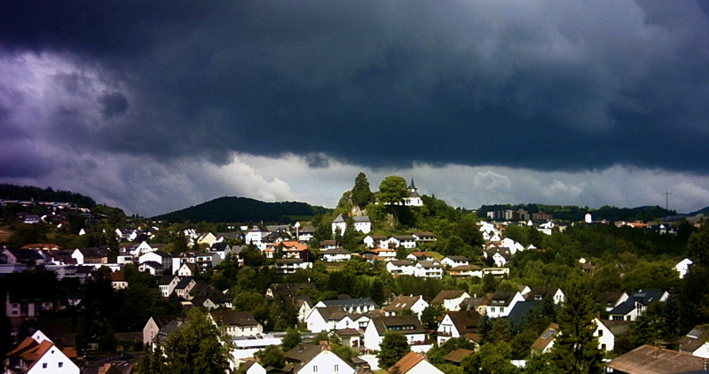 Sommerpanorama von Daun/Eifel Sicht vom Viadukt westwärts auf den Burgberg Fotograf: Michael Meding Quelle: Selbst fotografiert 2005